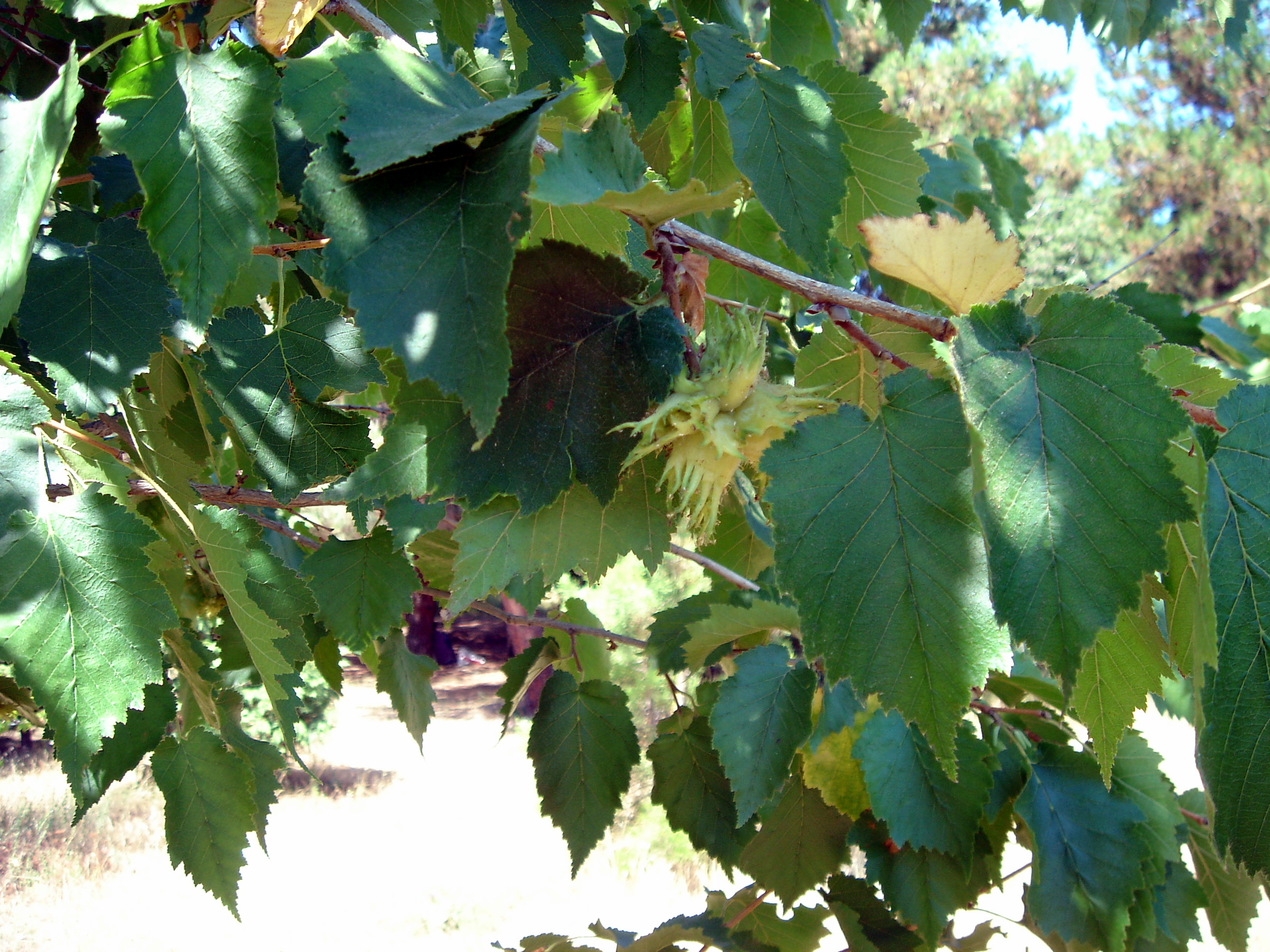 Ağaç fındığı (Corylus colurna)